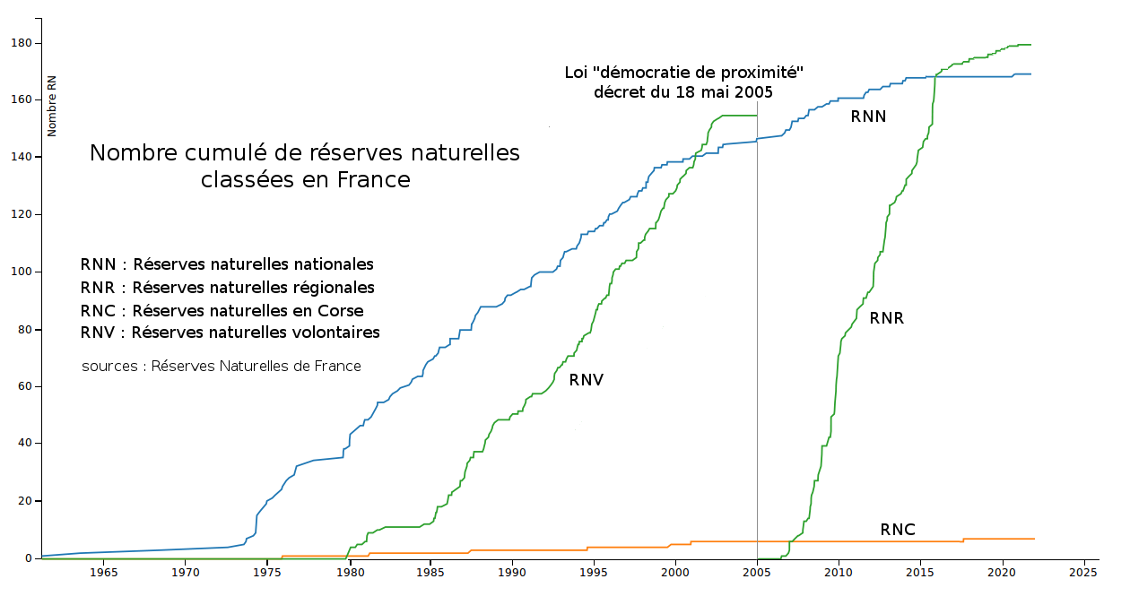 Évolution du nombre cumulé de réserves naturelles en France. La loi "démocratie de proximité" abroge les RNV et crée les RNR. Leur nombre rattrape maintenant les RNN.